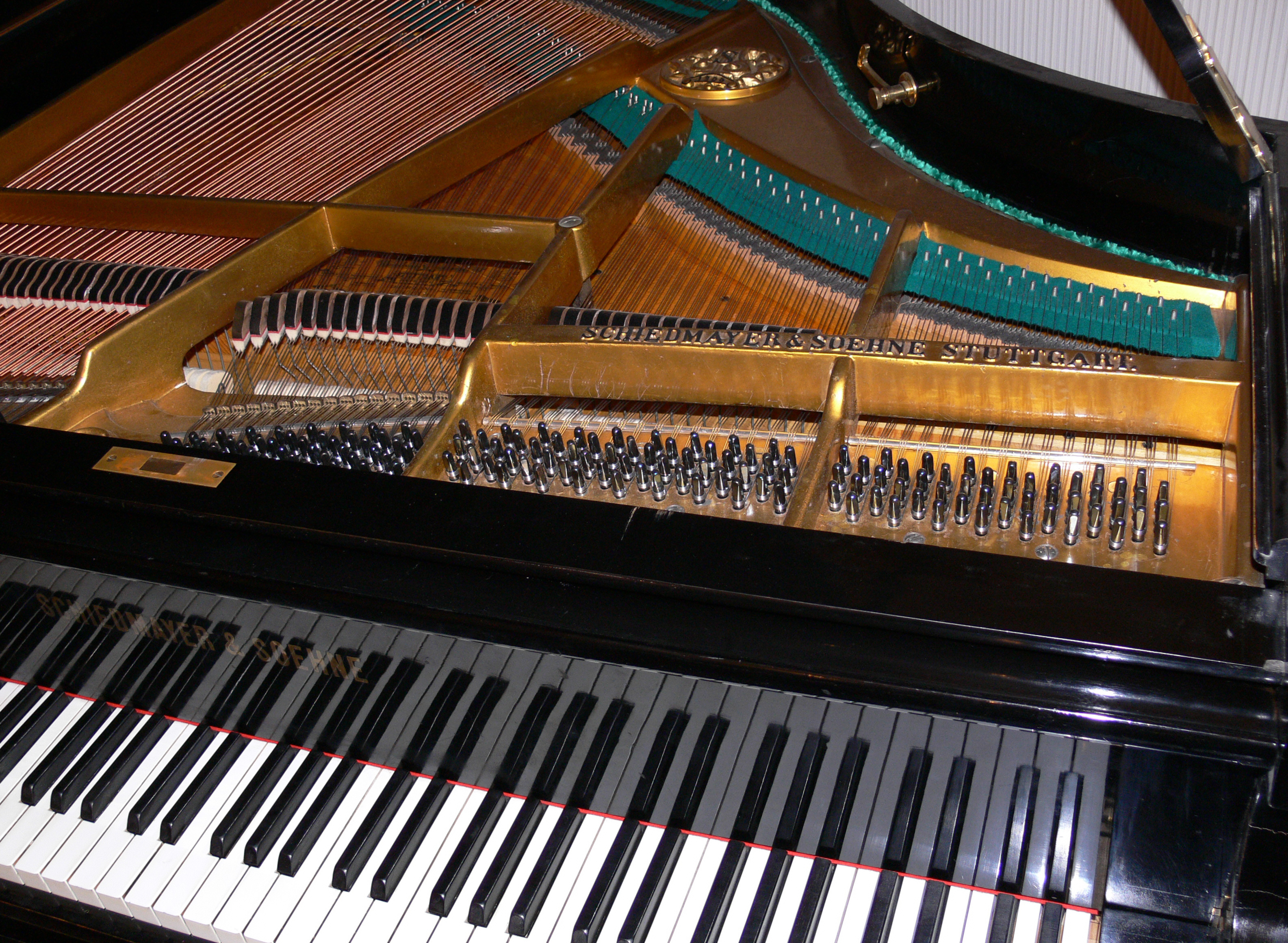 Schiedmayer & Söhne, Stuttgart, Grand Piano, Model 20 (1926-1930)